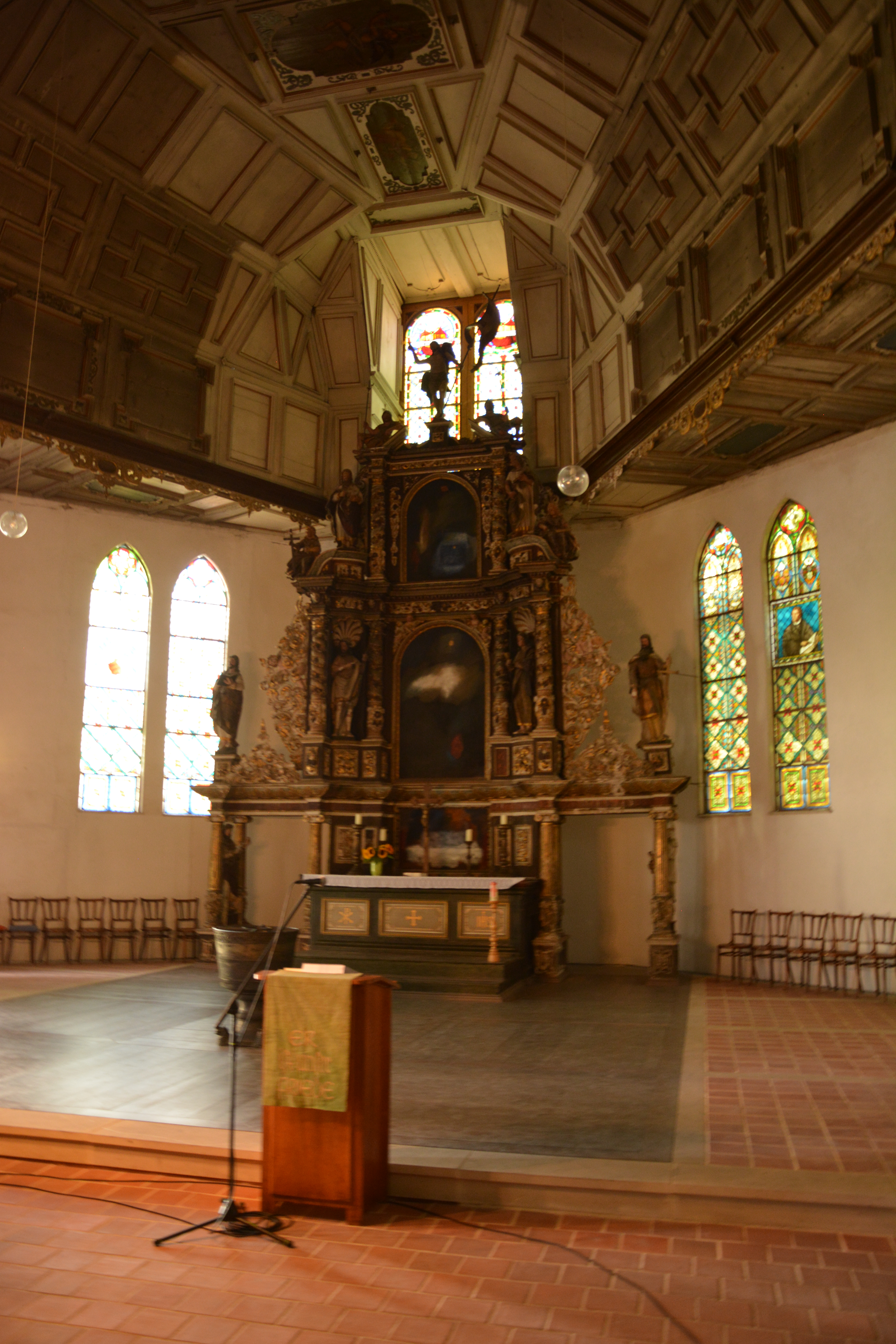 Innenansicht von St. Johannis mit Altar